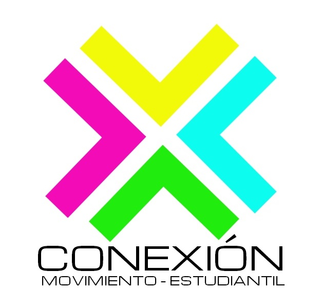 Conexión Usemista, Movimiento Estudiantil de la Universidad Santa María.